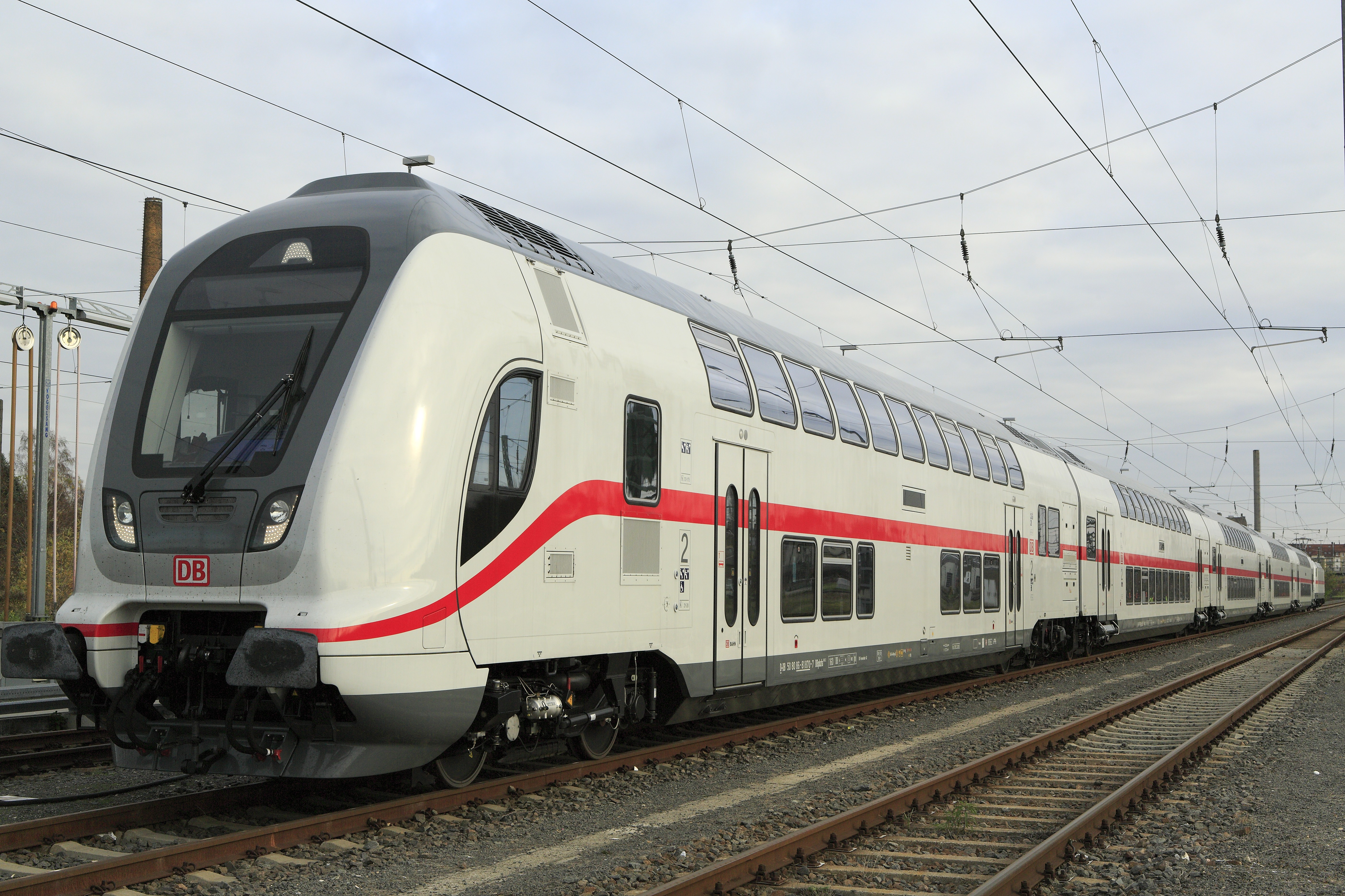 Für Personalschulungen aufgerüstet abgestellt. Nicht ganz verständlich ist die Ausrüstung von Lok und Steuerwagen mit Halogenscheinwerfern. Stand der Technik dürften die bereits bei vielen Fahrzeugen eingebauten LED-Einsätze sein.